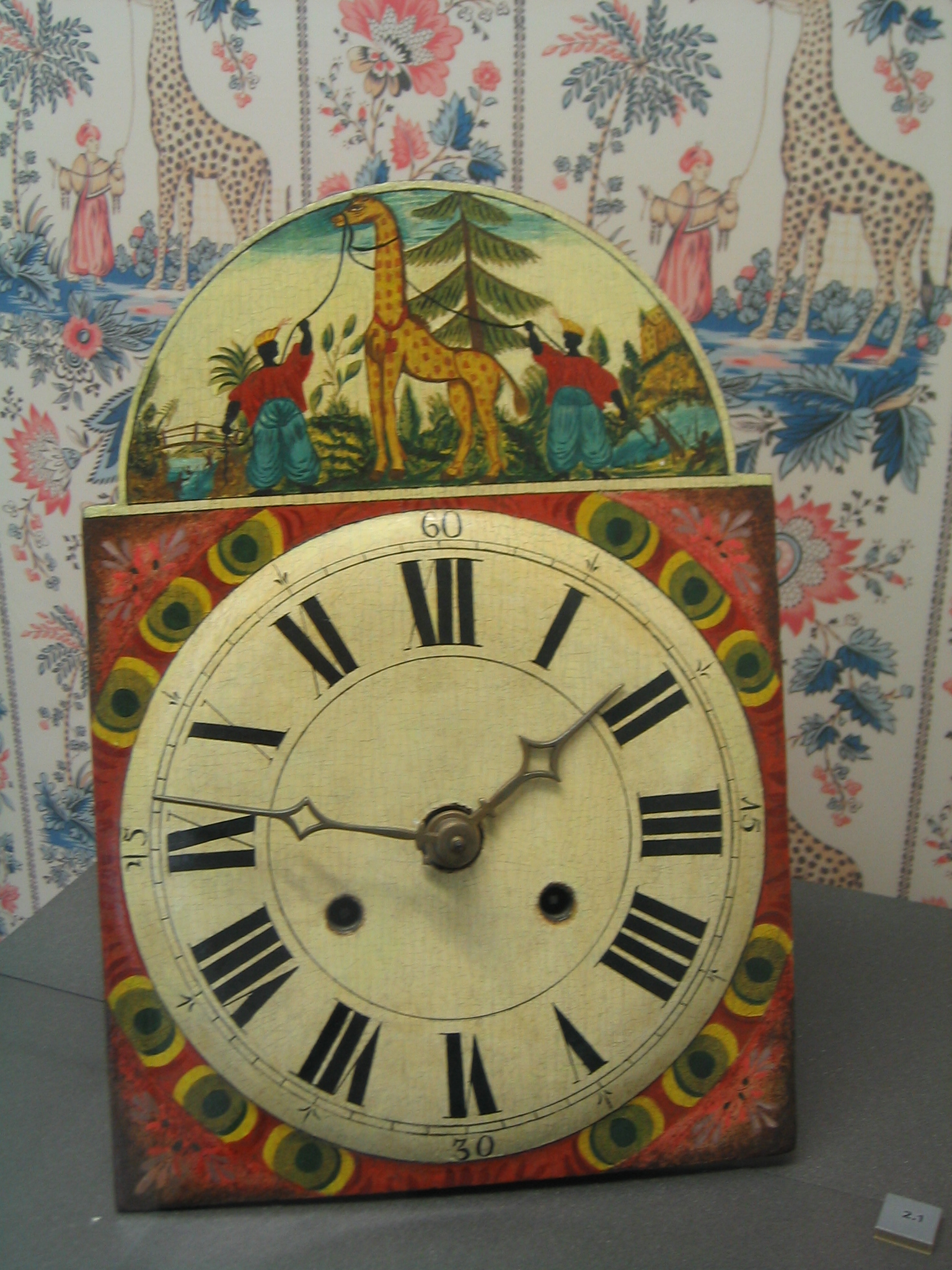 Exotische Lackschilduhr mit Giraffe aus dem 19. Jahrhundert im Uhrenmuseum Furtwangen